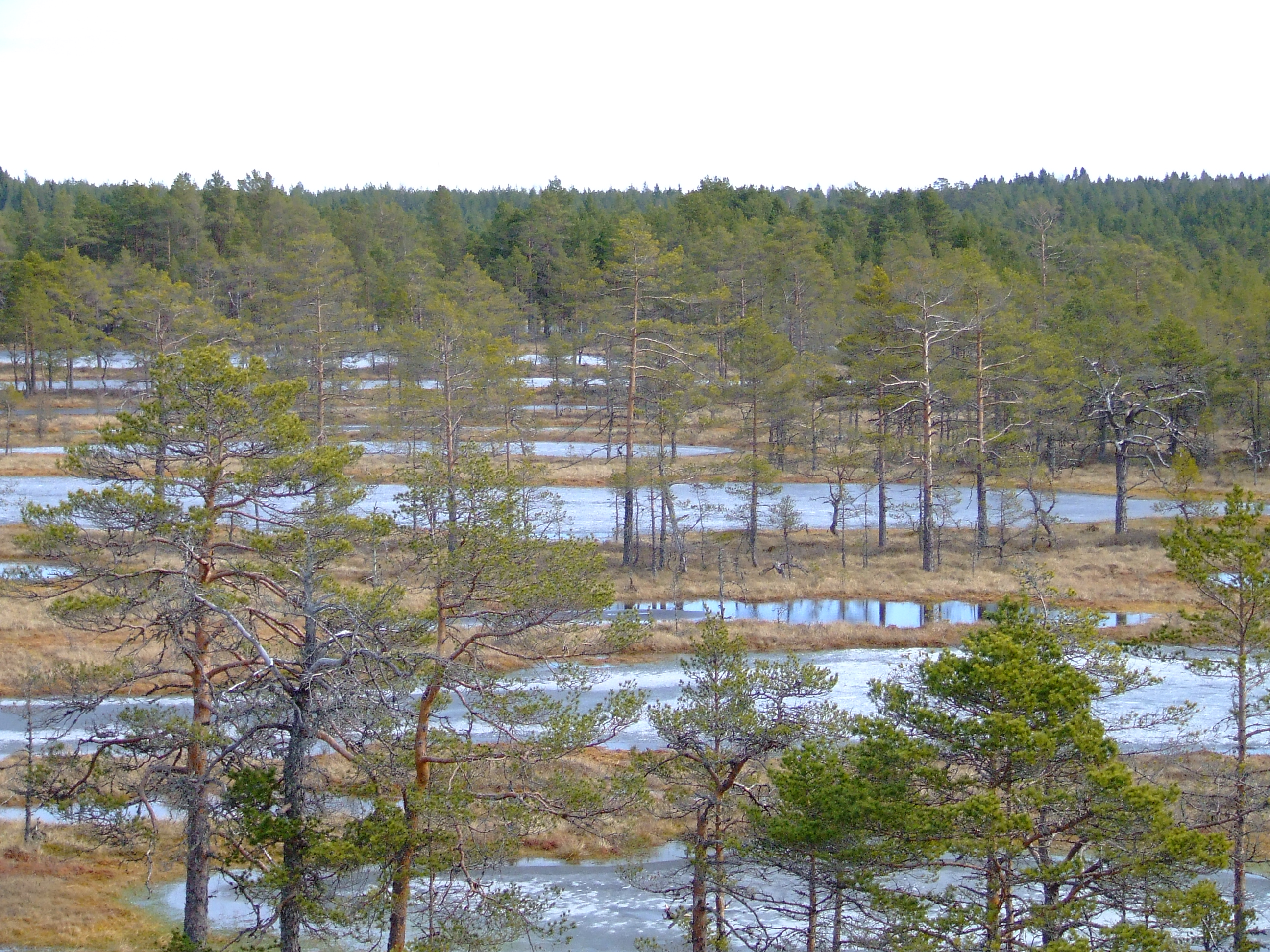 taken in Lahemaa National Park